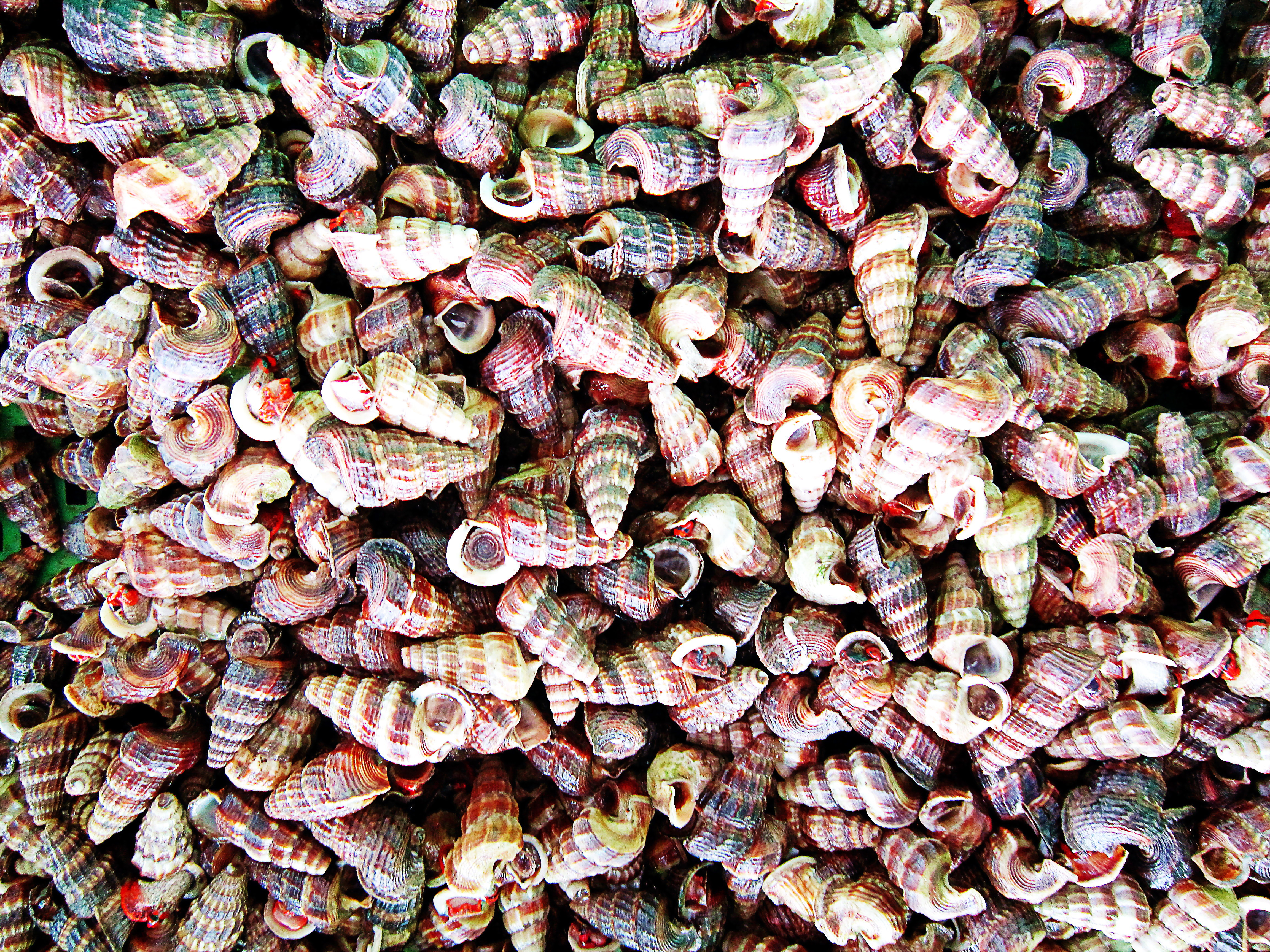 Ốc len được bày bán ở chợ Bà Rịa, Việt Nam.